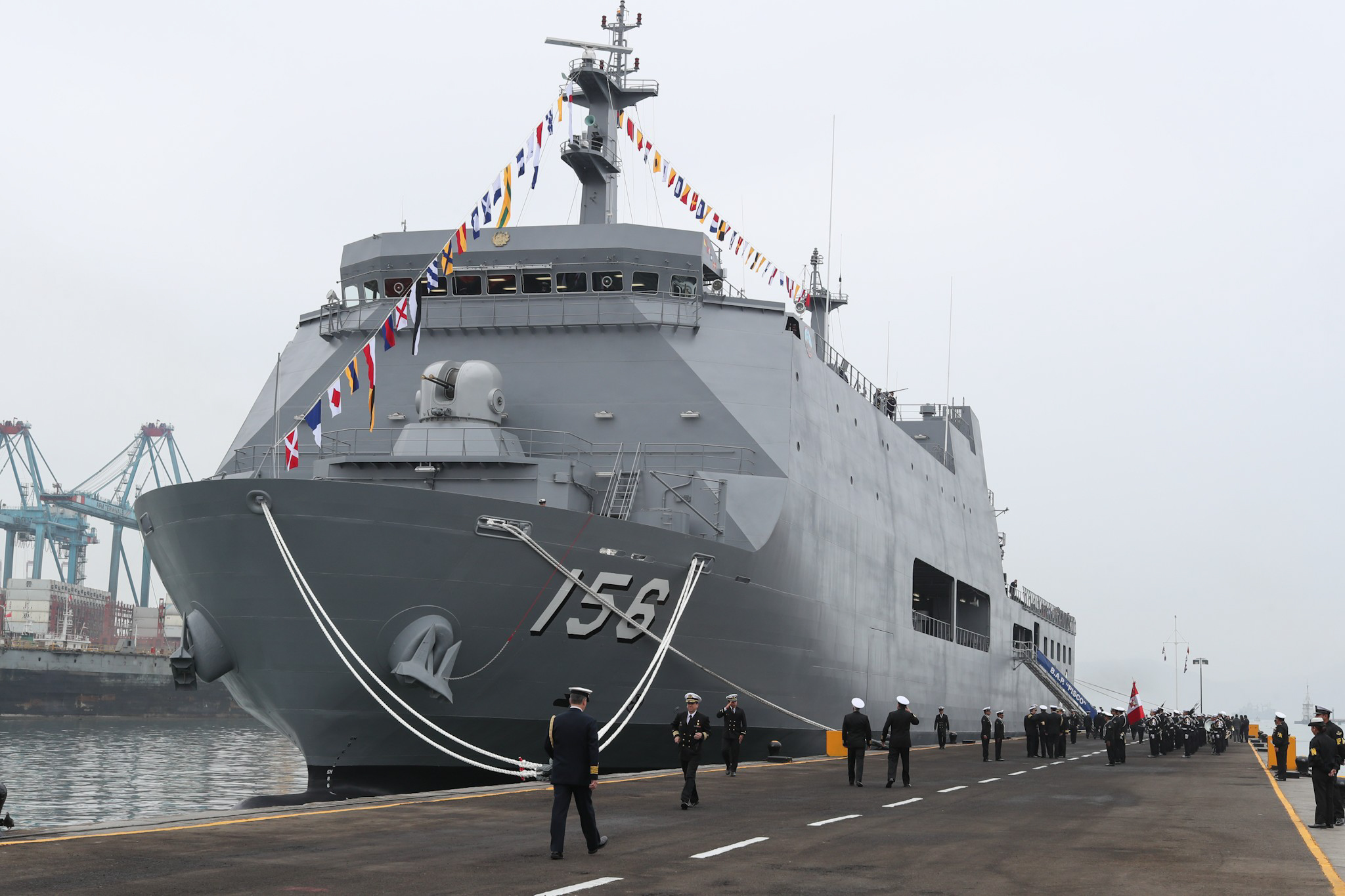 Ceremonia de izamiento de pabellón nacional en BAP Pisco